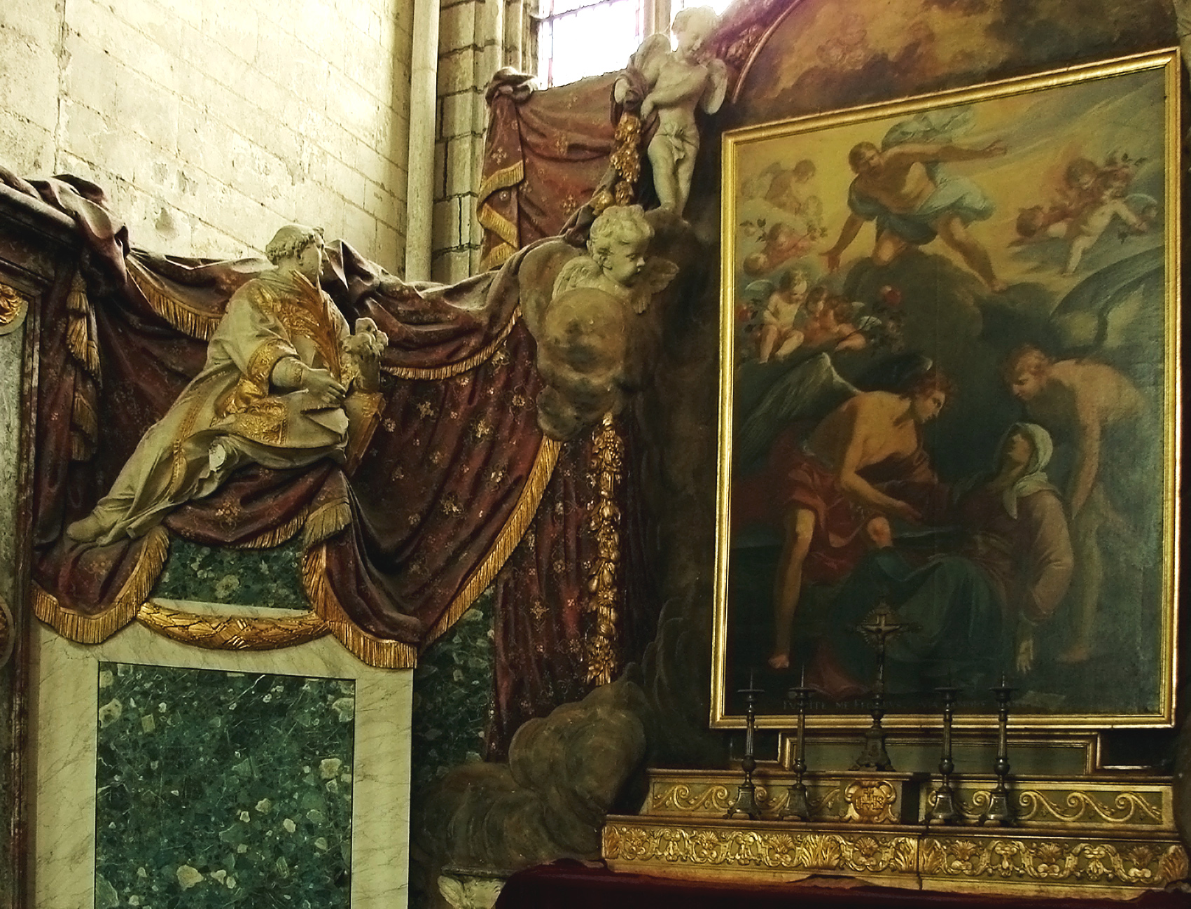 Chapelle Saint-Etienne appelée aussi Chapelle Saint-Laurent: statue de Saint Etienne et tableau de Laurent de la Hyre, La Pâmoison de la Vierge (1628). Le décor de la chapelle a été dessiné par Christophle en 1768. Cathédrale d'Amiens.